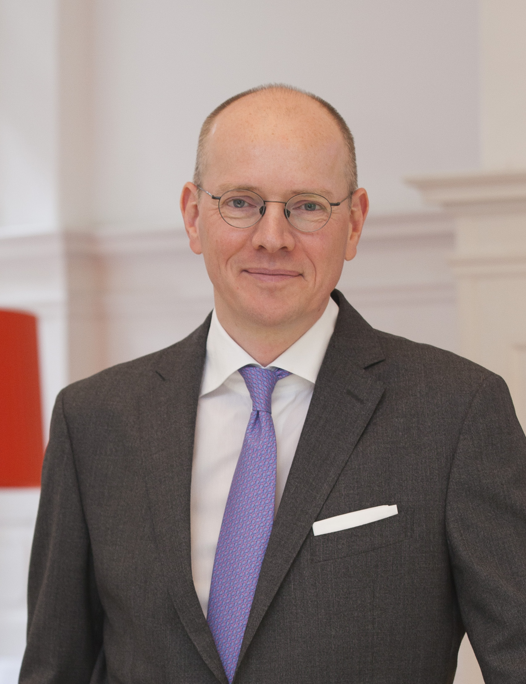 Stephan Bone-Winkel